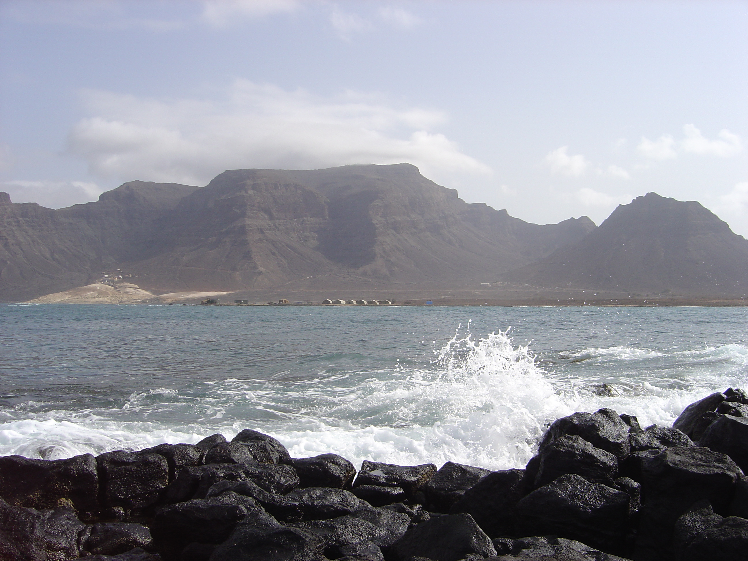 Monte Verde, São Vicente, Cabo Verde